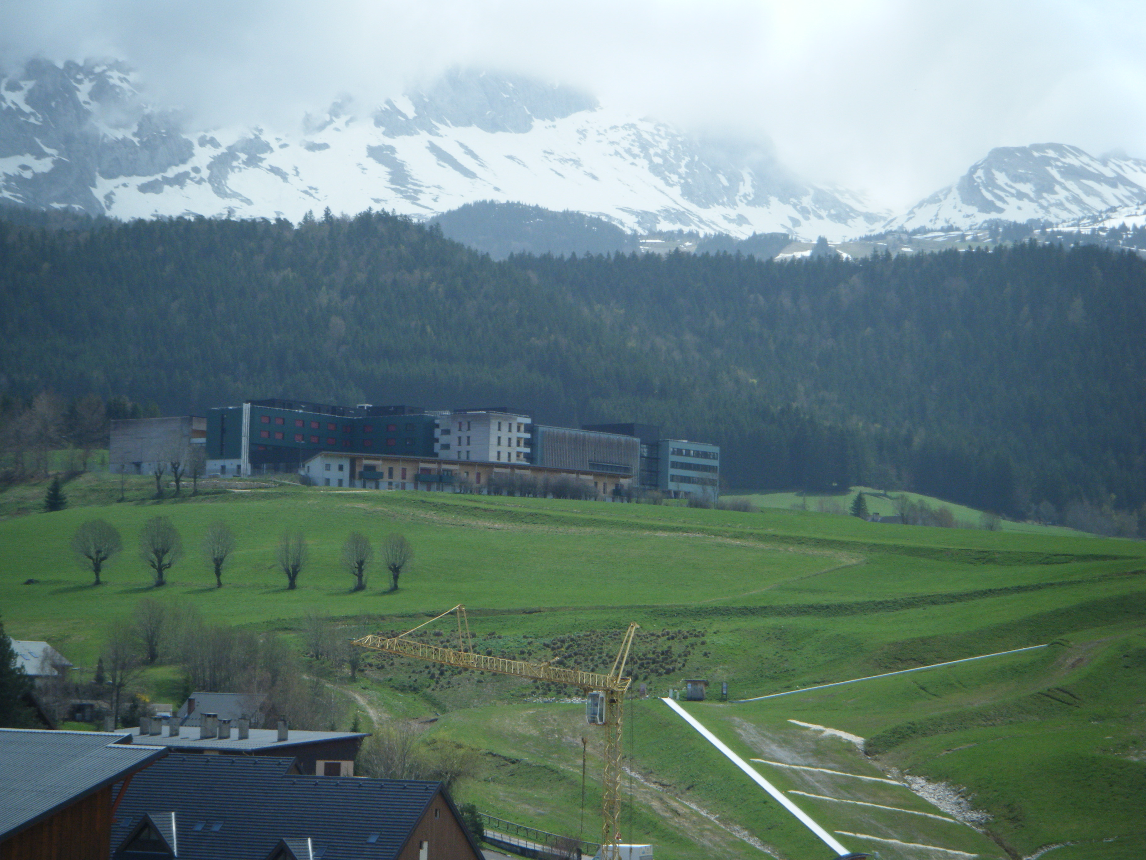 le lycée climatique et la colline des bains